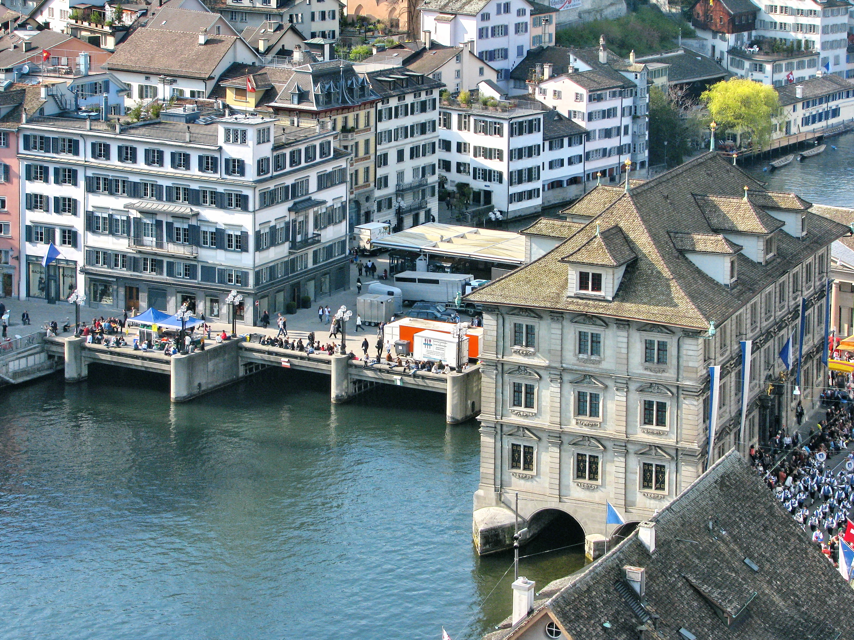 Rathausbrücke, Haus zum Schwert and Rathaus as seen from Grossmünster's Karlsturm